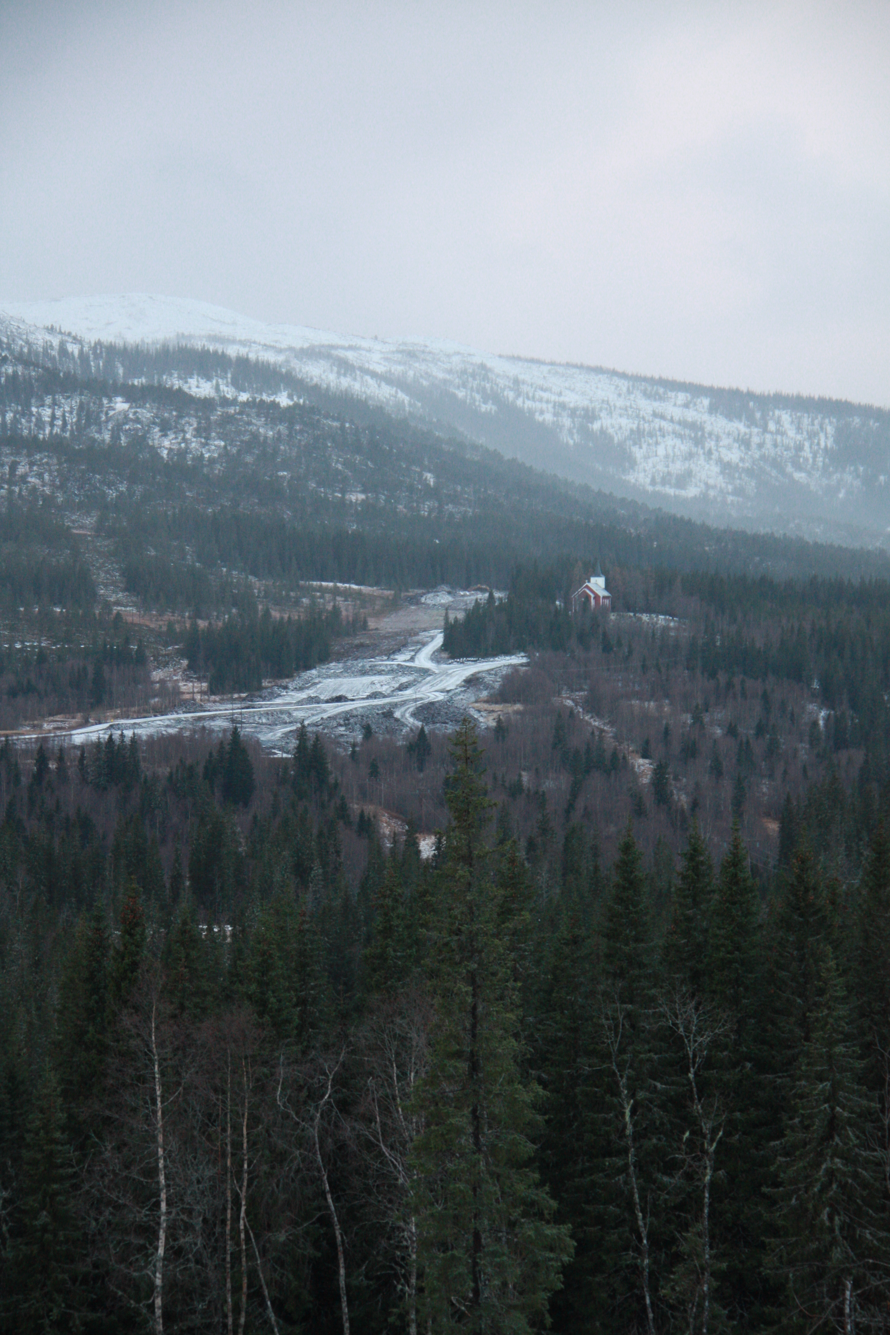 Anleggsområde for ny fylkesveg 78 ved Drevja kirke